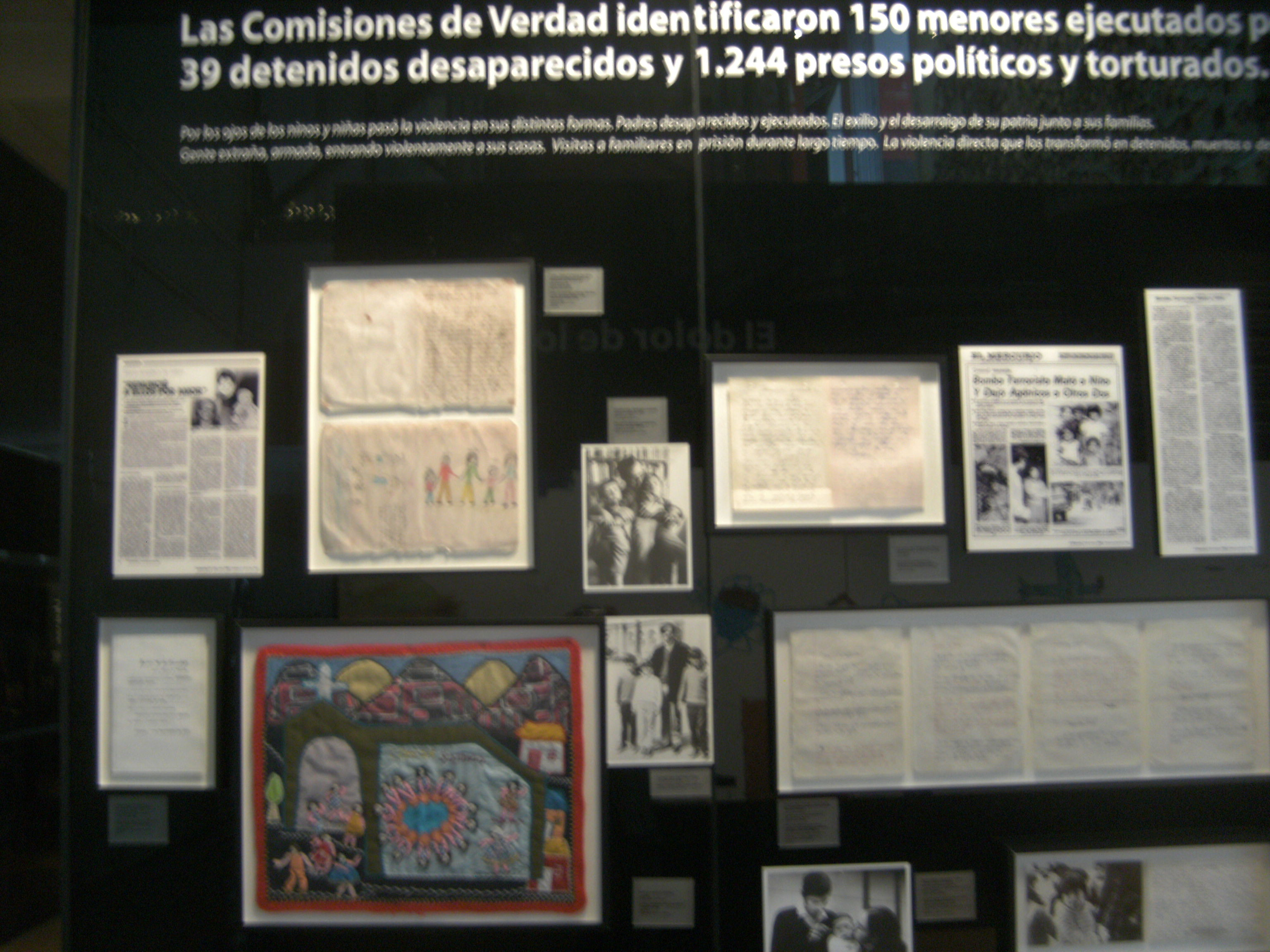 Aspectos del Museo de la Memoria y los derecho Humanos de Chile